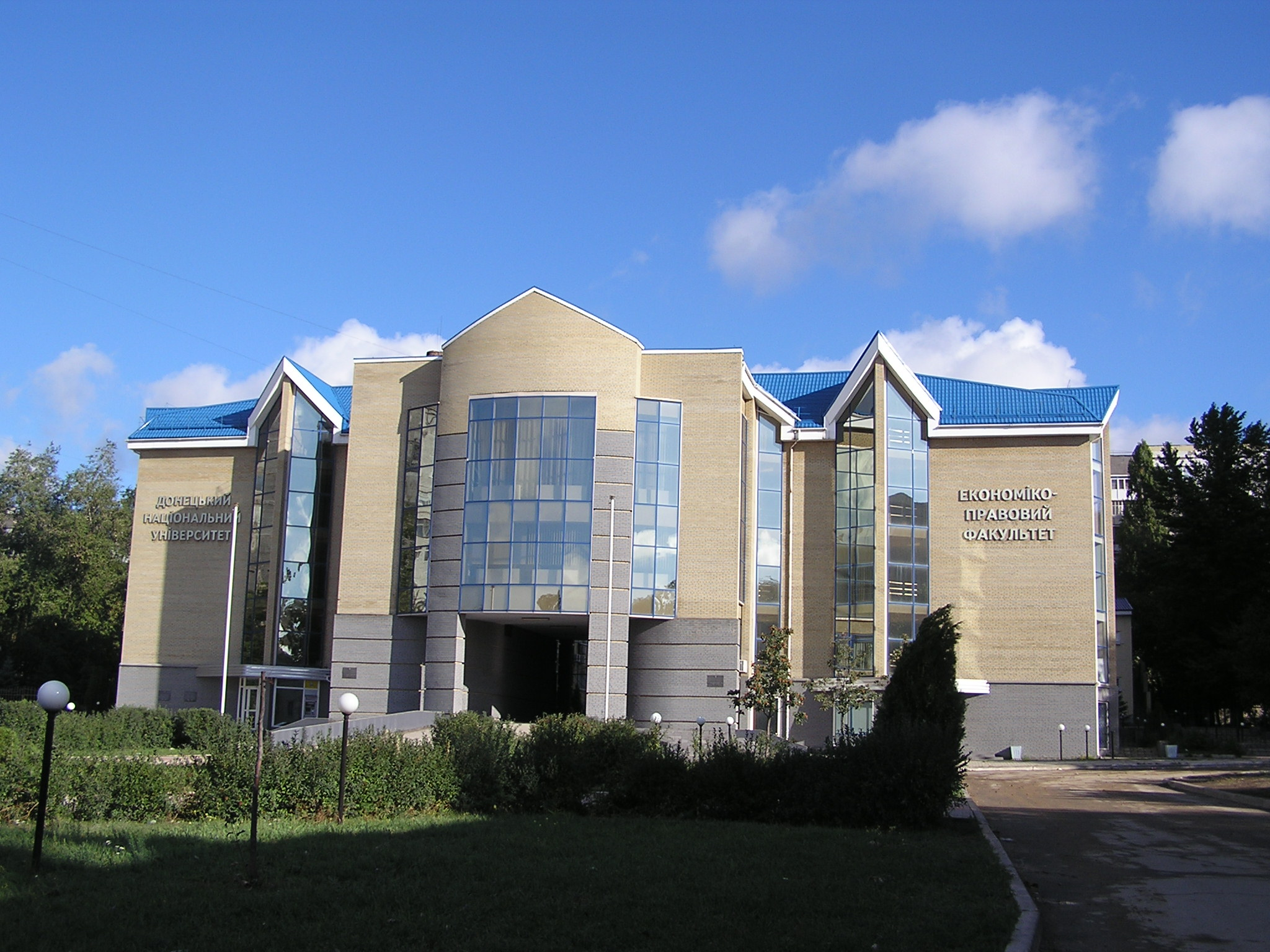 Донецкий национальный университет